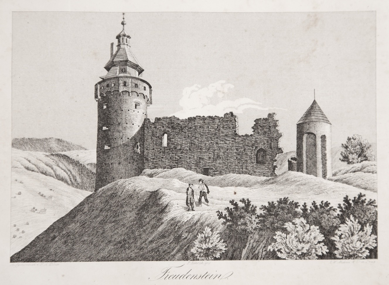 Stahlstich mit einer Ansicht der Burg Freudenberg in Jáchymov